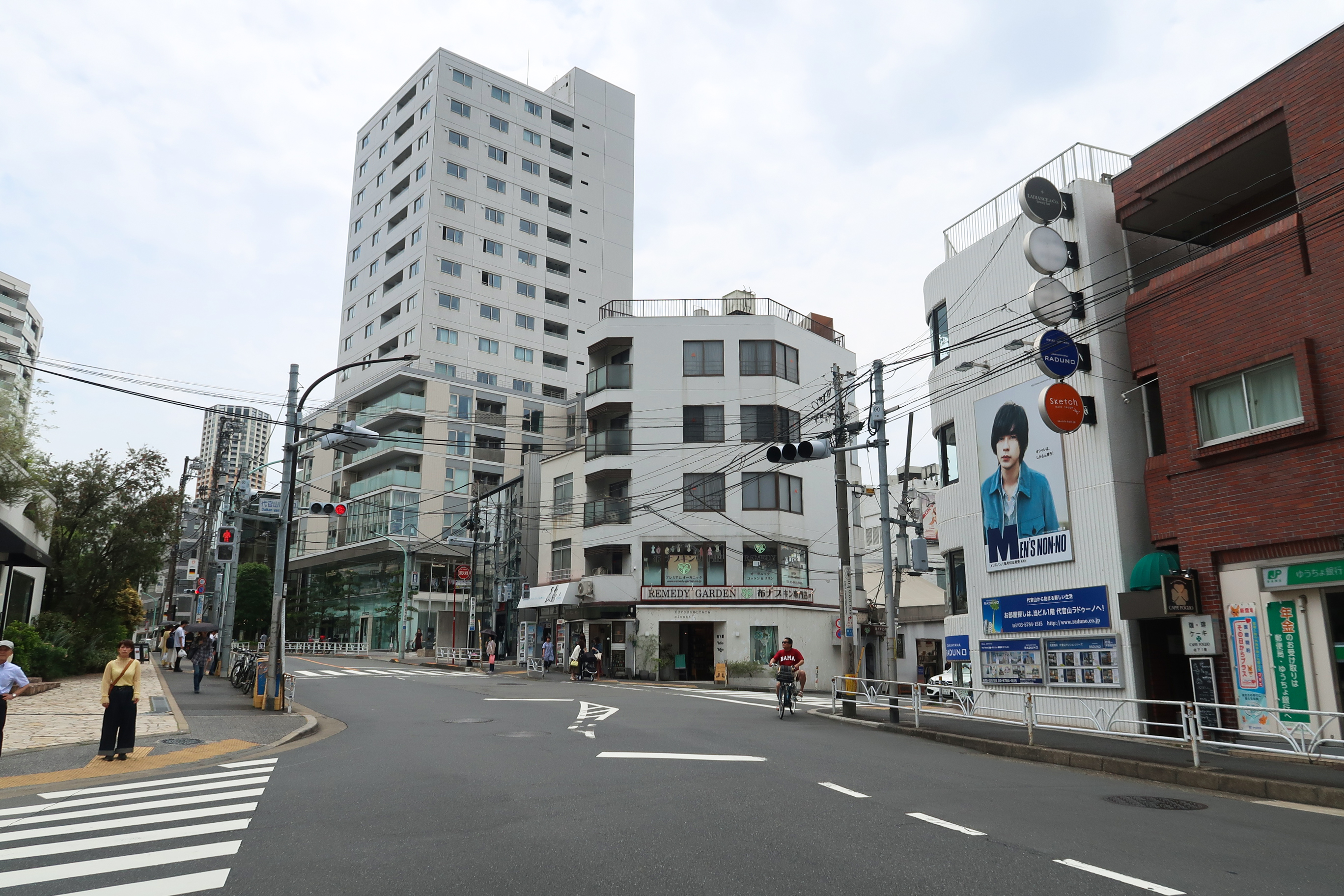 Sarugakucho